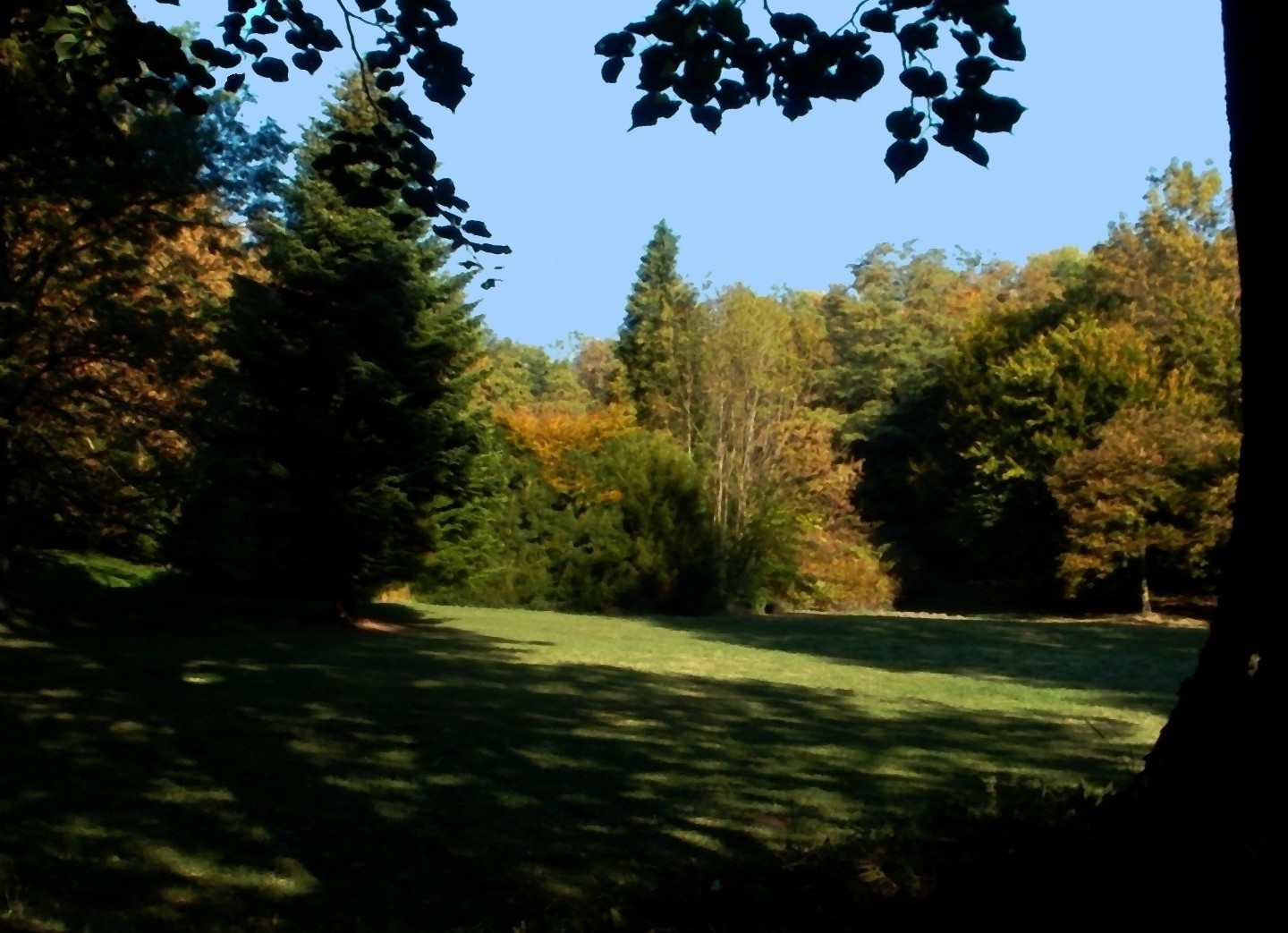 v. Sibrik kastély (Bozsok, Rákóczi Ferenc u. 1 .) This is a photo of a monument in Hungary, Identifier: 8817